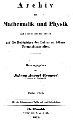 Portada del primer volum de la revista Archiv der Mathematik und Physik (1841)